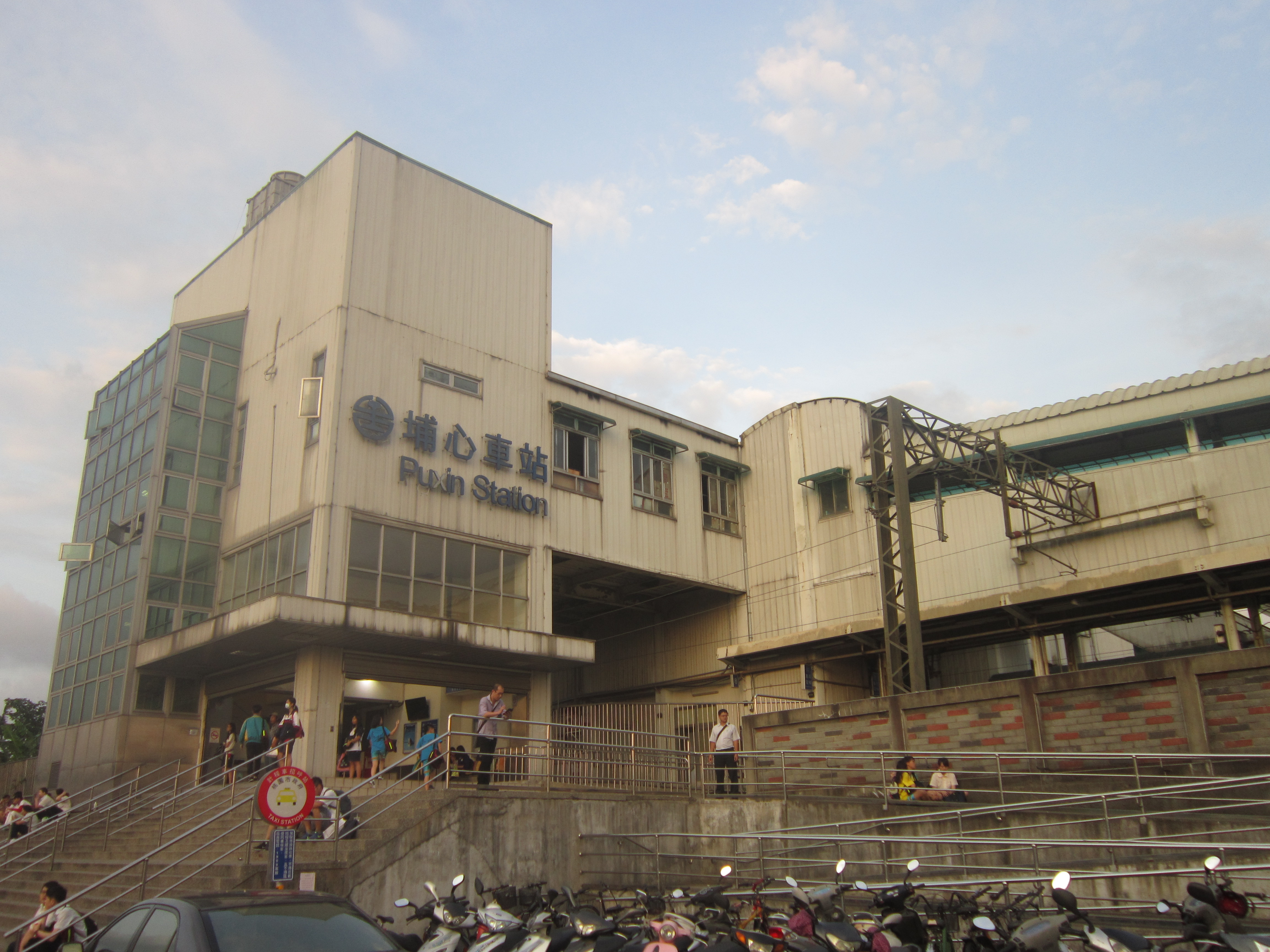 埔心車站後站